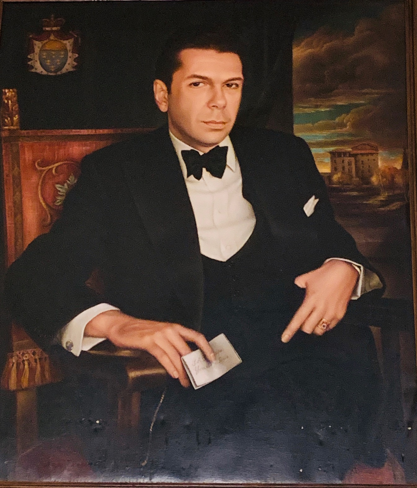 Il quadro del pittore Ulisse Sartini rappresenta Gherardo Artico, XVIII° Principe di Porcia e Brugnera.